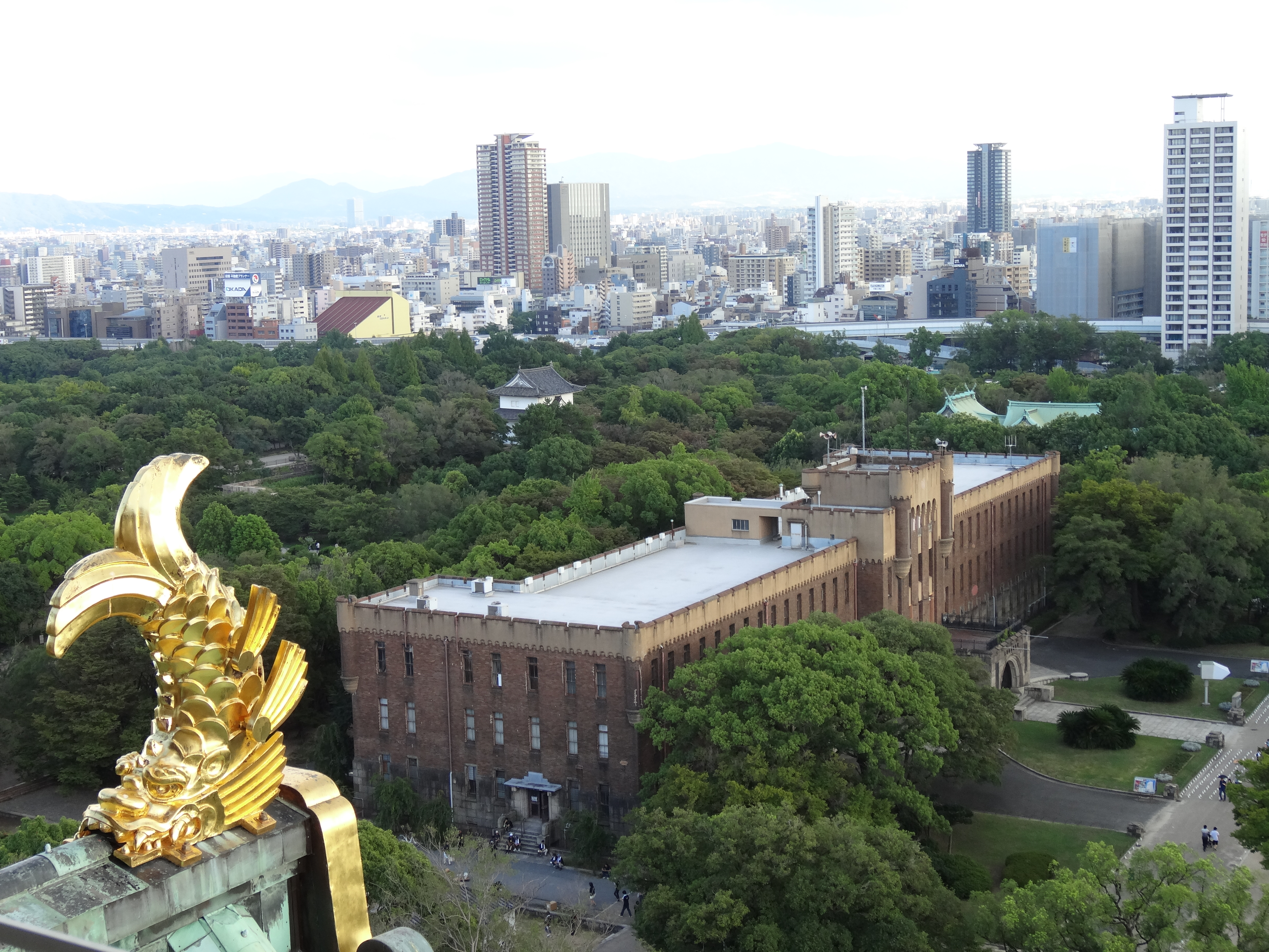 旧第四師団司令部庁舎、のちに旧大阪市立博物館